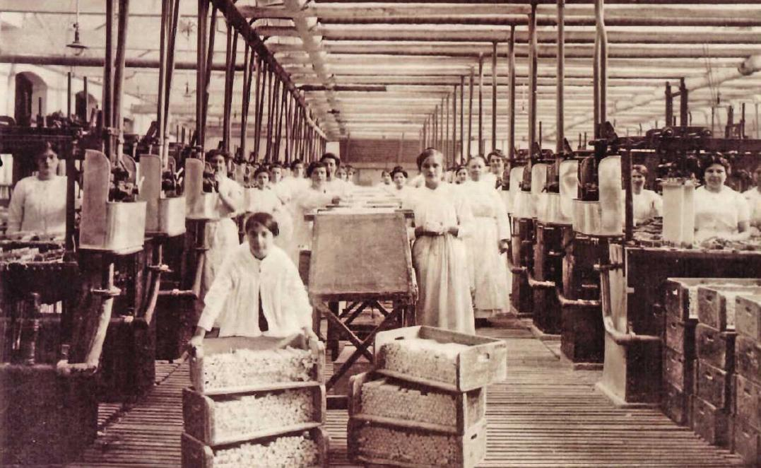 Op de foto de kaarsenmakerij omstreeks 1920